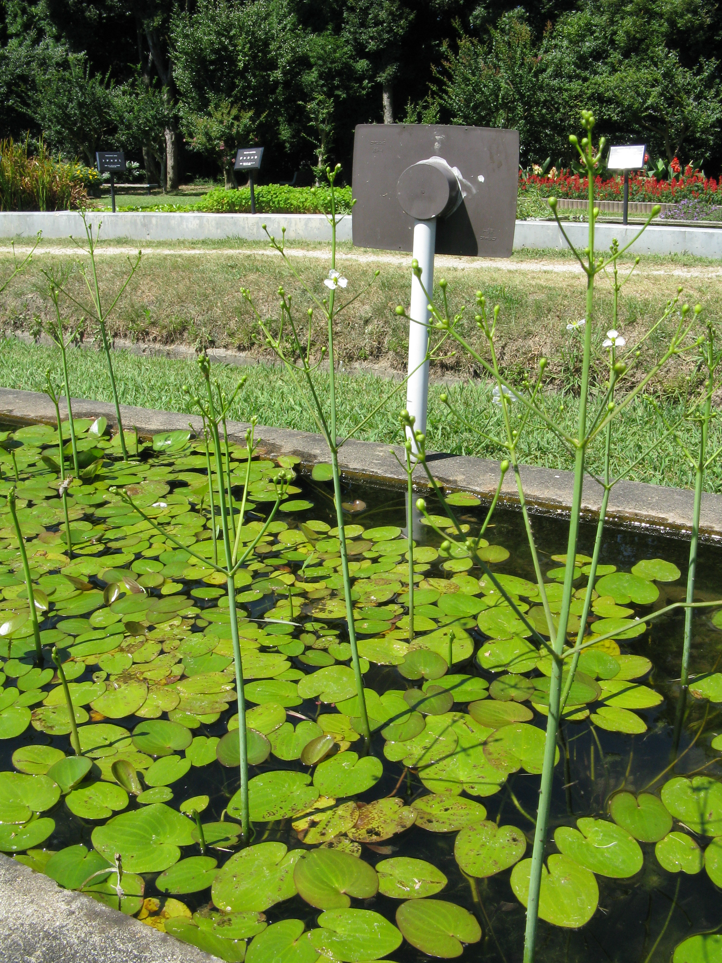 Scientific name Caldesia parnassiifolia